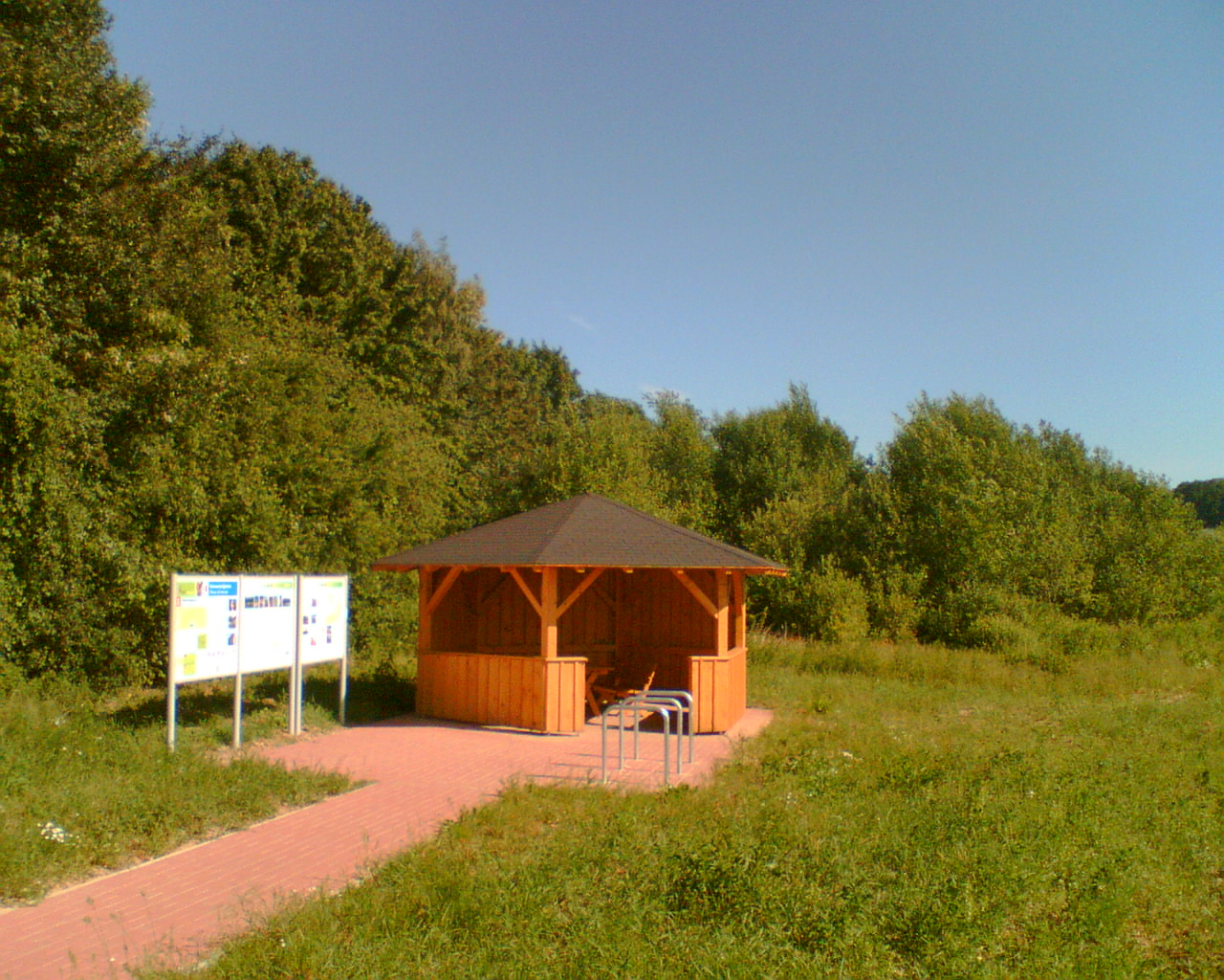 Unterstand, Anlehnbügel und Infotafeln am Europaradweg R1 zwischen Eilensen und Markoldendorf.